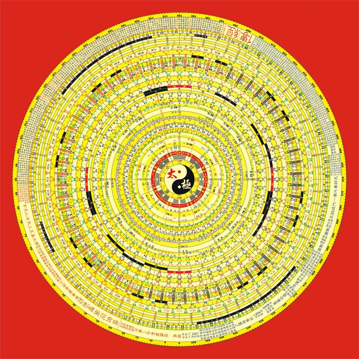 小羅盤圖